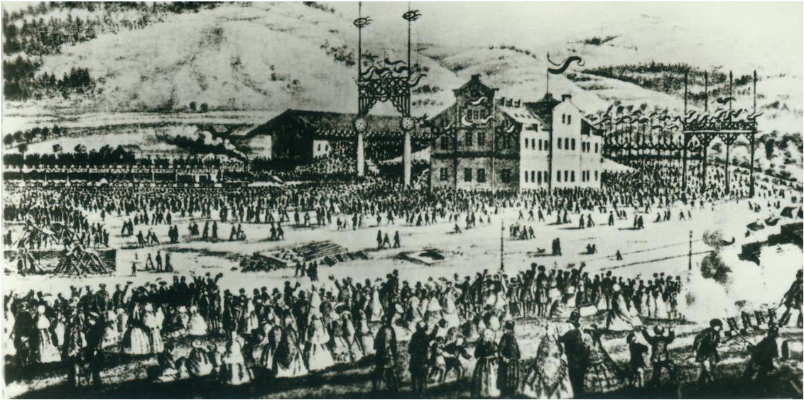 Nachdruck einer Lithografie (1858) in der Schwarzenberg Beilage zu den "Erzgebirgischen Hausblättern" Heft 2/1862 : Eröffnung der Eisenbahn Zwickau-Schwarzenberg am 11. Mai 1858 mit dem Eintreffen des ersten Zuges im Bahnhof Schwarzenberg